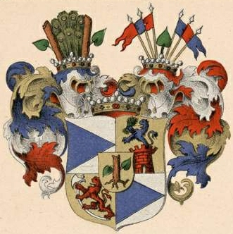 Taube suguvõsa vabahärravapp